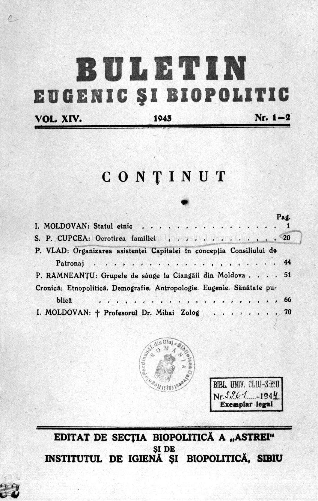 Conținut Buletin eugenic si biopolitic, Vol. XIV, 1943.